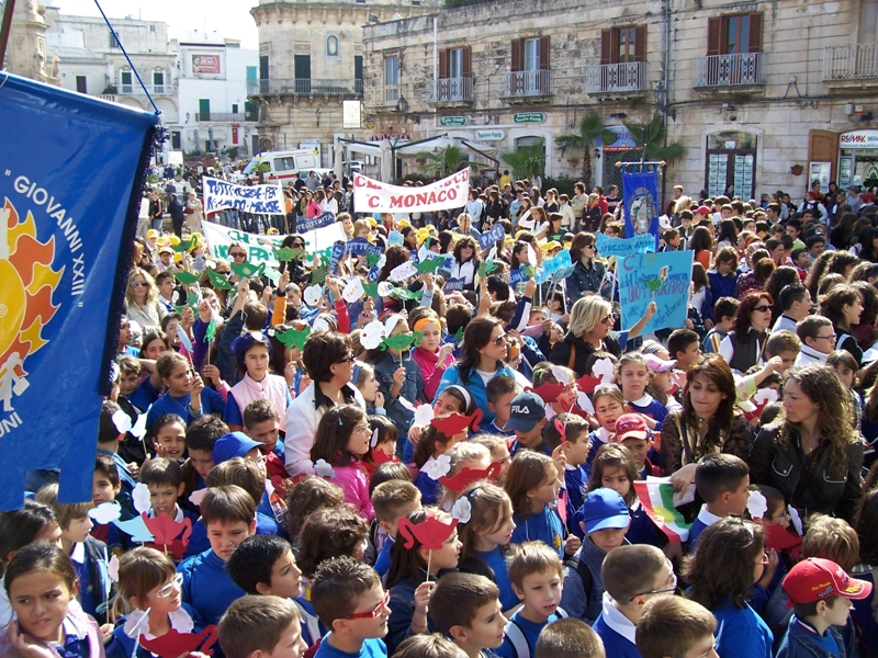 Festa di apertura della Settimana dei Bambini del Mediterraneo